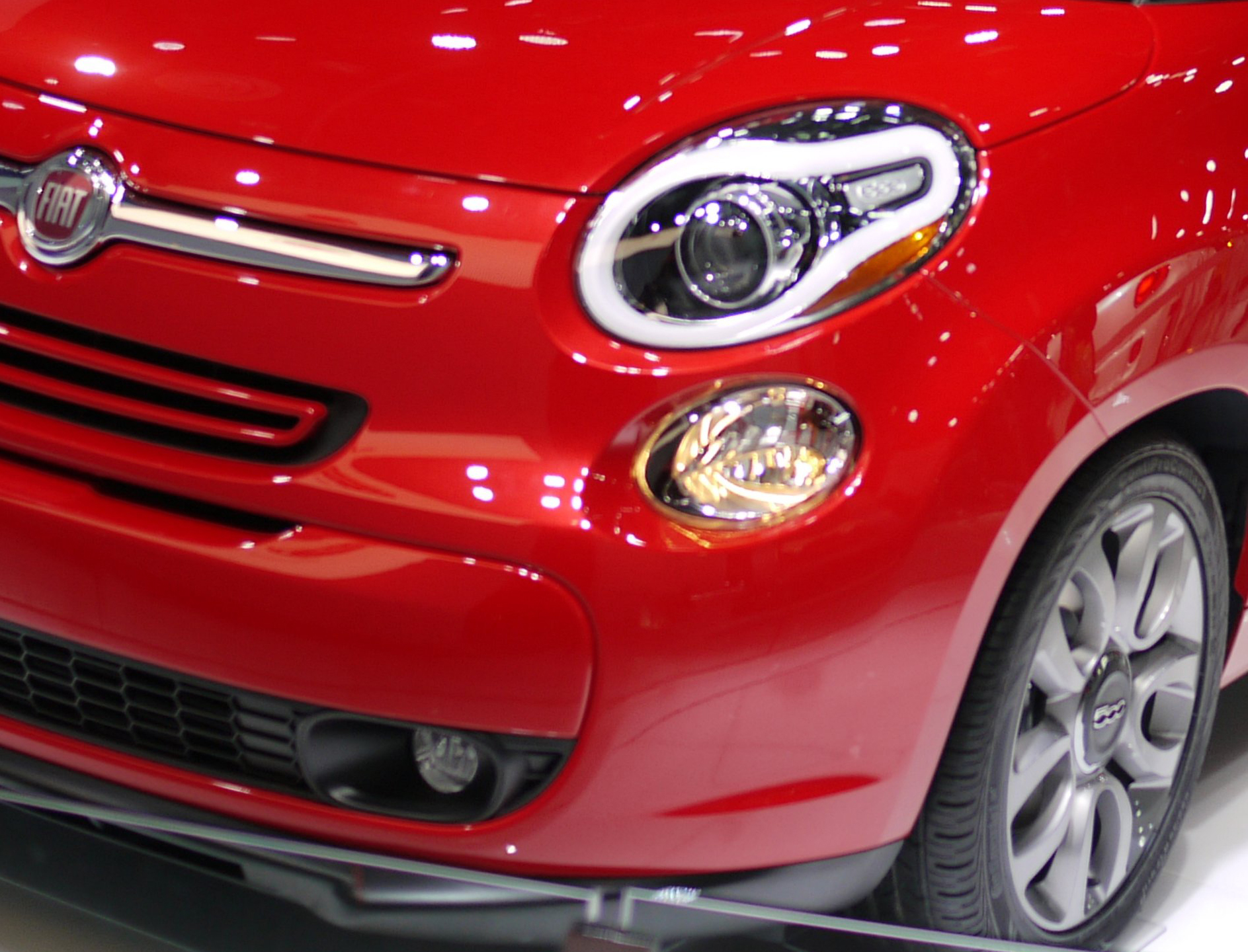 Particolare dei gruppi ottici anteriori a fascio di luce della nuova Fiat 500L per il mercato nord americano